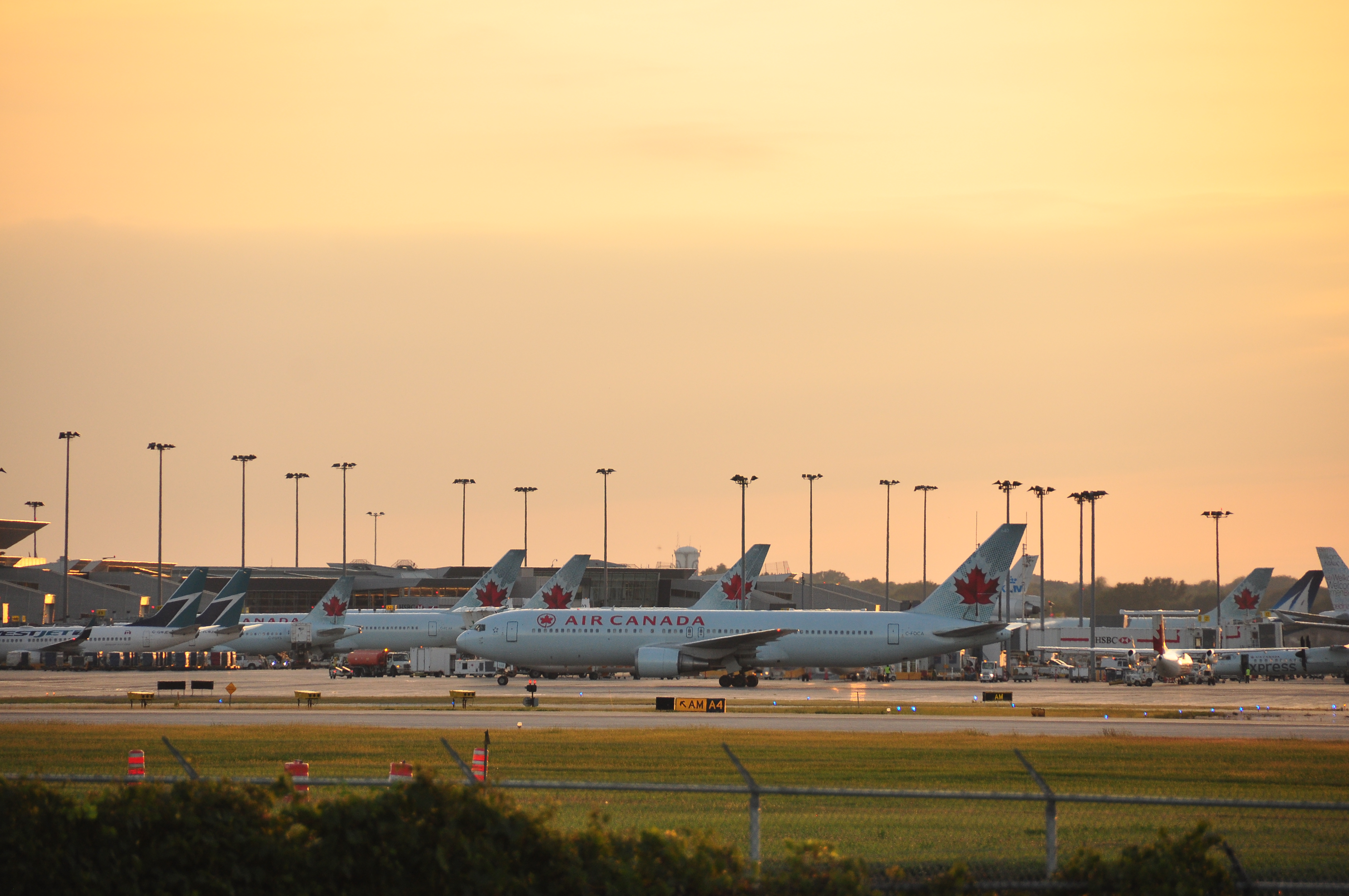 Départs sur la piste 06 droite au coucher du soleil à YUL